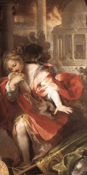 detail